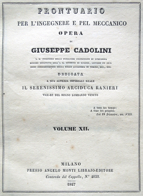 Frontespizio del volume di Giuseppe Cadolini